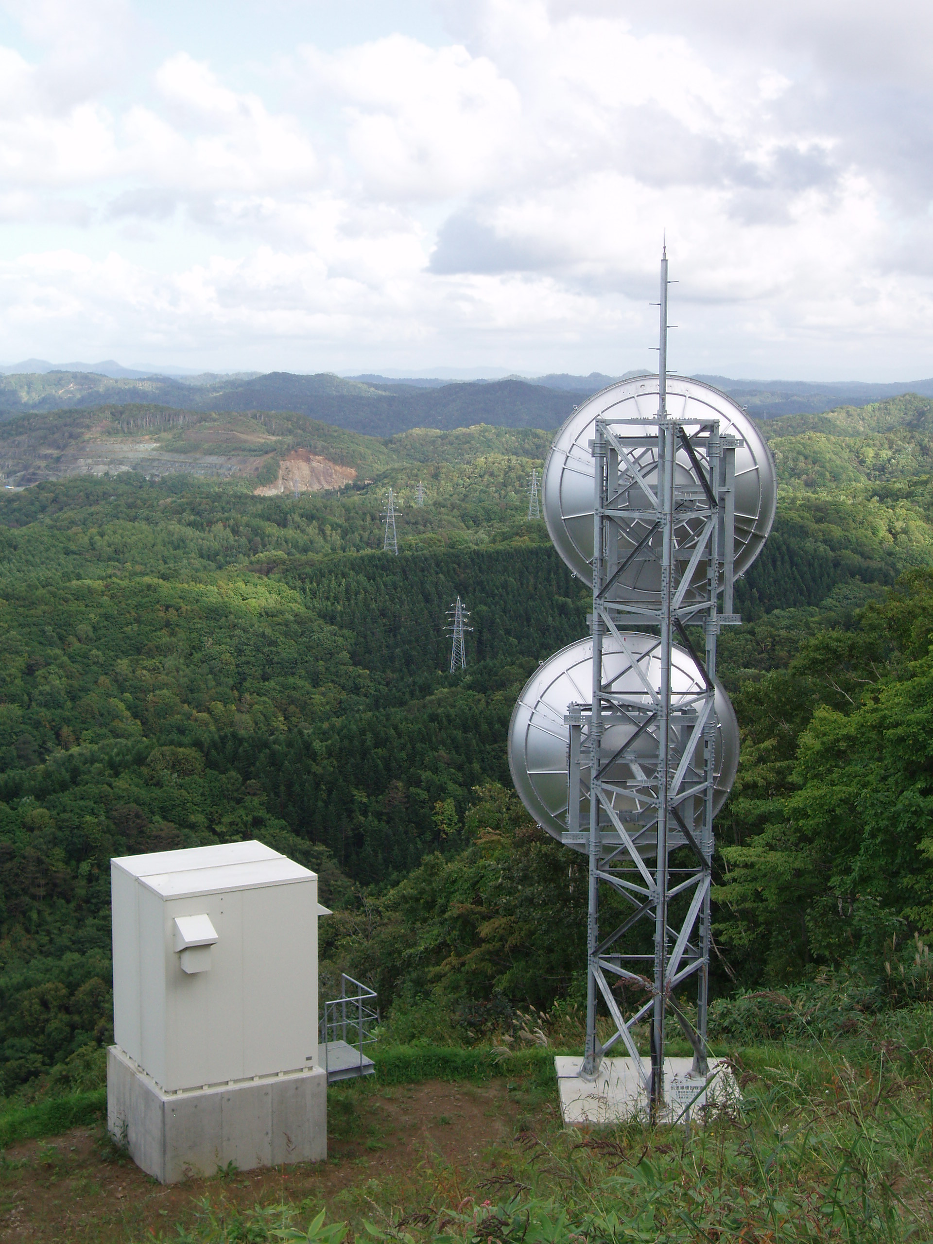 留萌中継局 受信設備（デジタル）